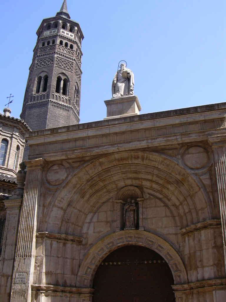 Zaragoza - San Pablo - Puerta principal y torre